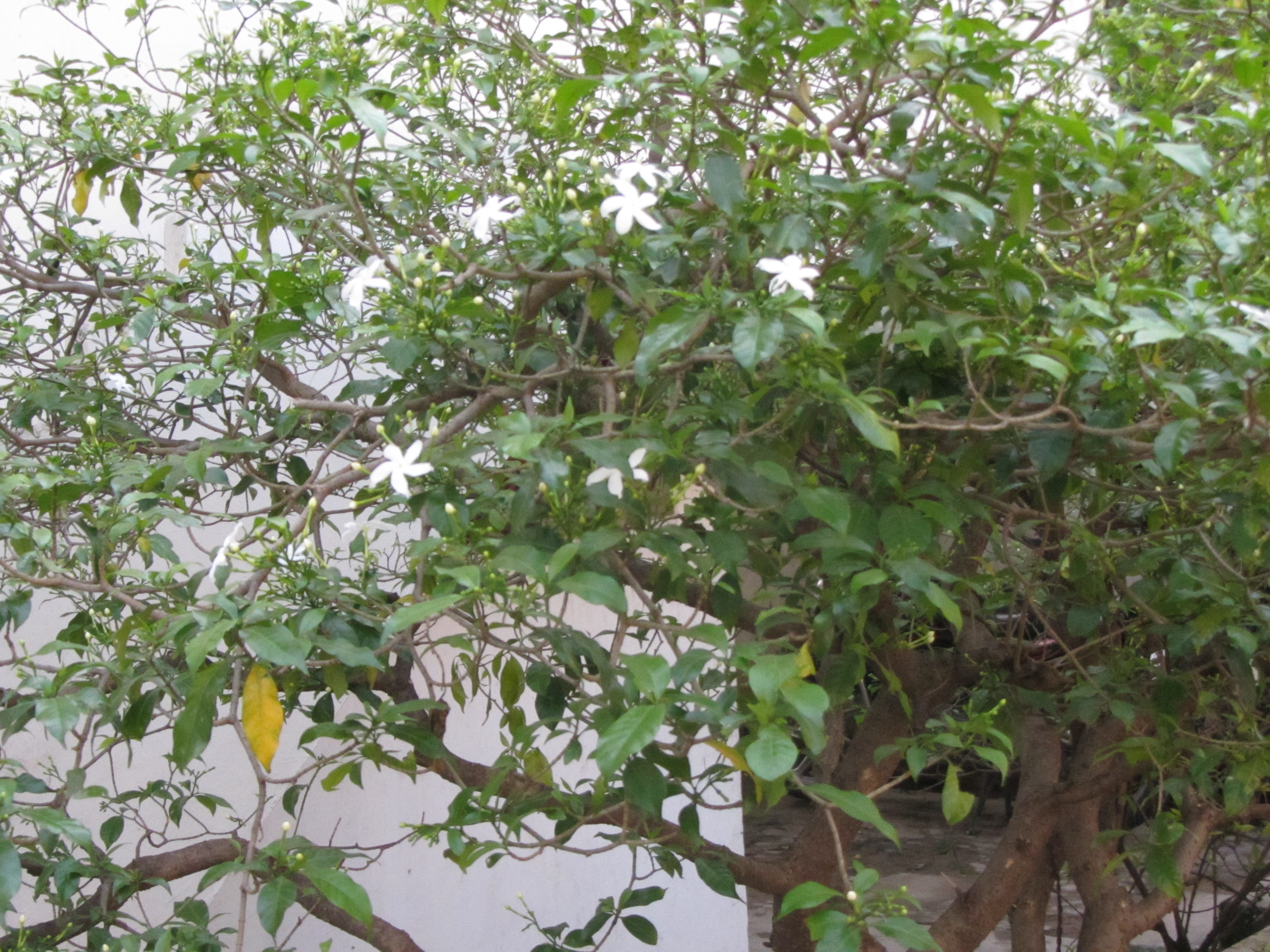 own shot சங்கநூல் குறிஞ்சிப்பாட்டு இதனை நந்தி எனக் குறிப்பிடுகிறது. இக்காலத்தில் இதனை நந்தியாவிட்டம் பூ என்கின்றர். இதில் அடுக்கு நந்தியாவிட்டை என்ற வகையும் உண்டு. இந்தப் பூவைக் கண்ணில் ஒற்றிக்கொண்டால் கண்ணுவலி விரைவில் குணமாகும்.